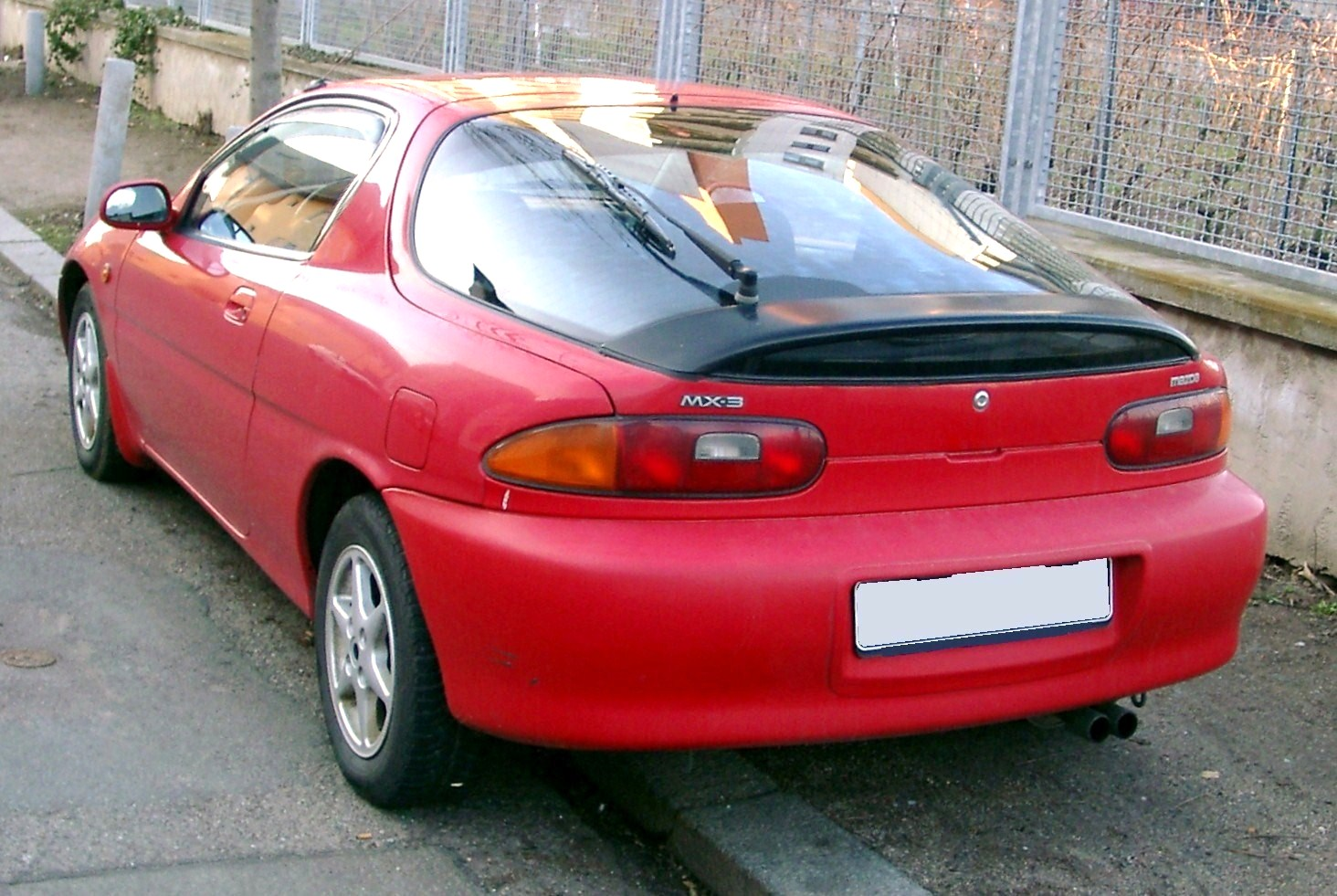 Mazda MX-3